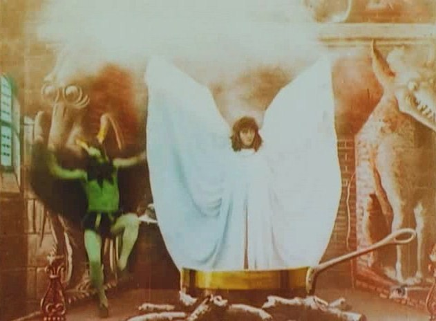 Méliès, La danse du feu (Star Film 188, 1899)